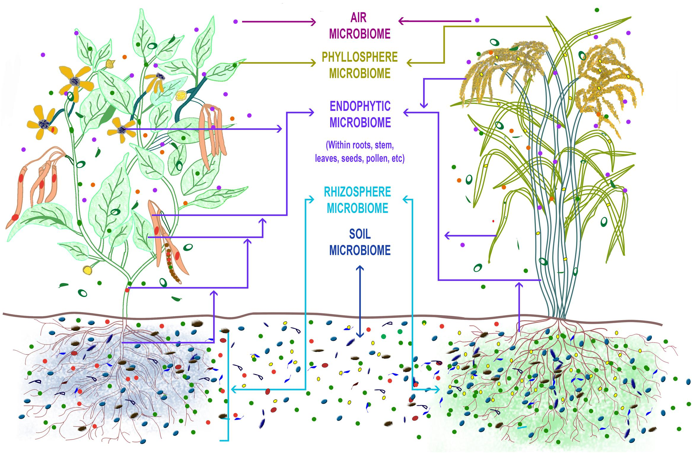 Phytobiome ou microbiome de la plante, compartimenté en rhizosphère (microbiote au niveau de la racine), endosphère (microbiote endophytique) et phyllosphère (microbiote au-dessus du niveau du sol).